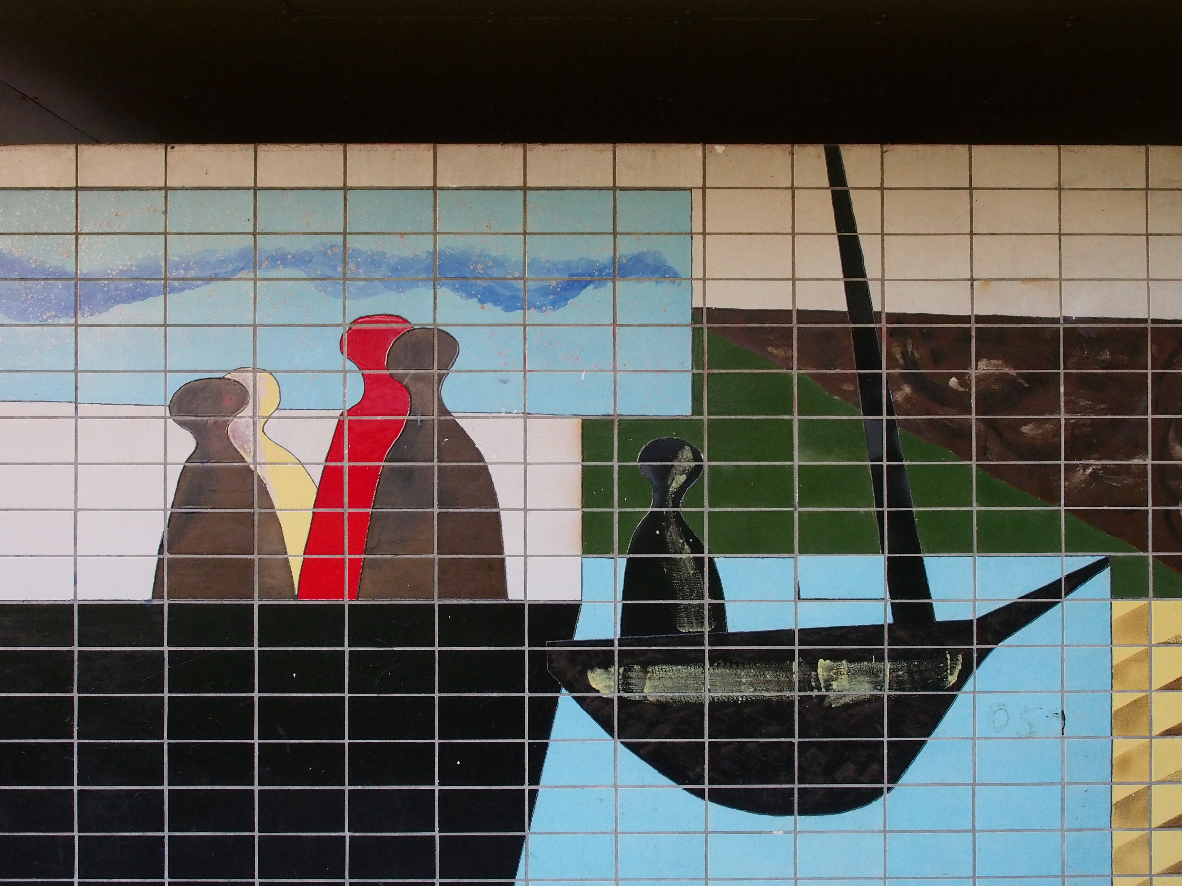 Tegeltableau Dick Elffers, 1965. Fietsenstalling Gerrit Rietveld College, Winklerlaan, Utrecht.